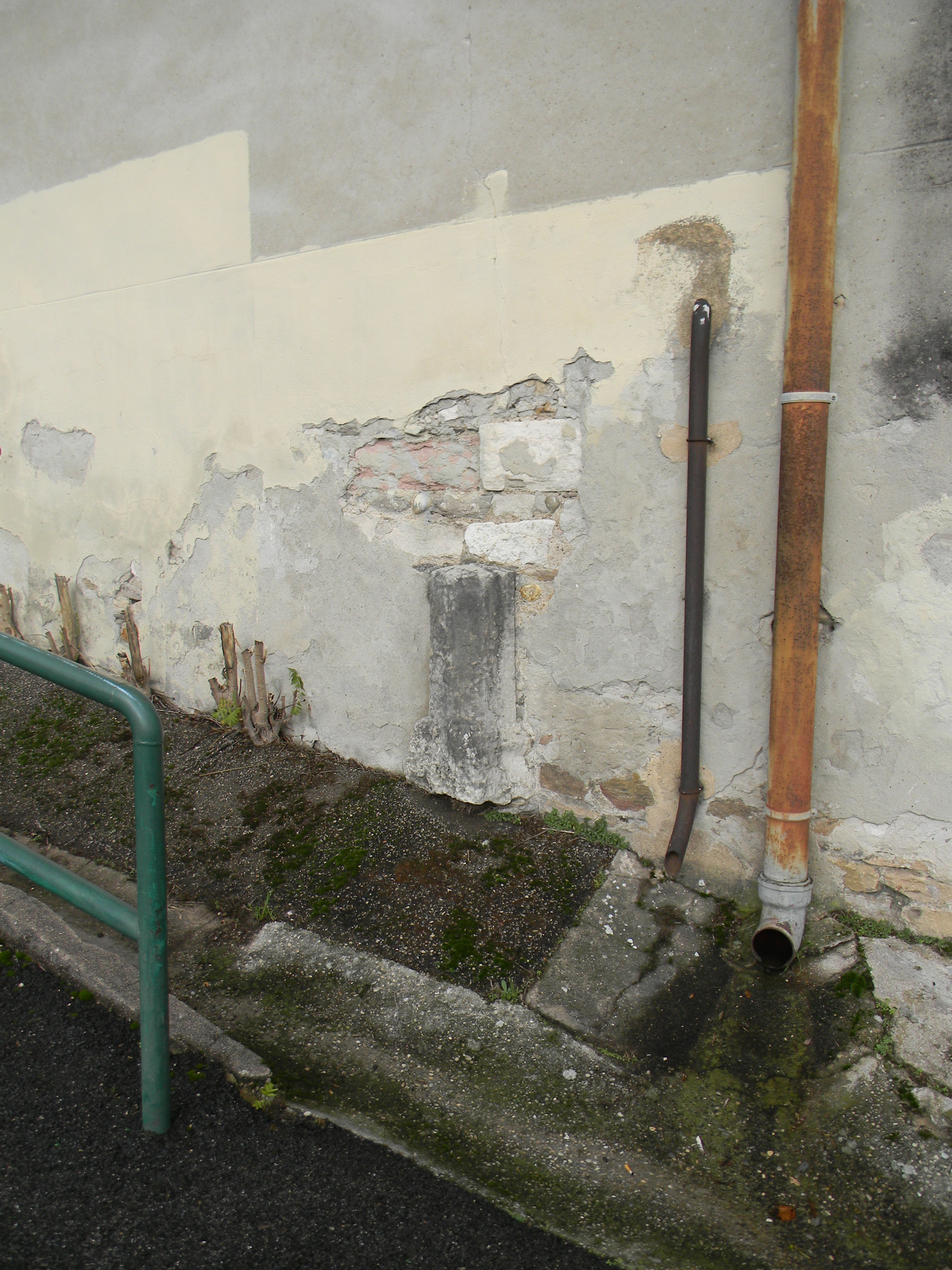 Une borne délimitant le terrain militaire du fort de Loyasse montée du Télégraphe à Lyon, arrachée puis utilisée pour la construction d'un mur civil, tout près d'un bastion de l'enceinte de Fourvière.